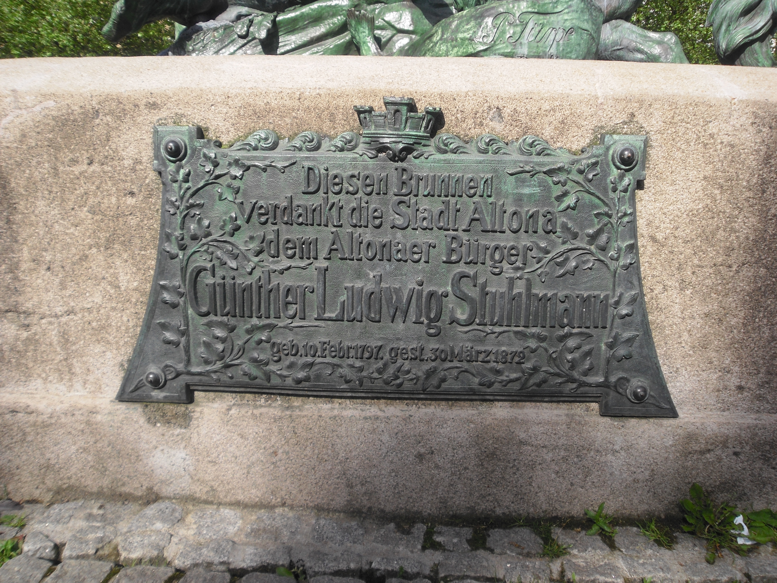 Gedenktafel für Günther Ludwig Stuhlmann (1797-1872), Unternehmer und Mäzen; Stuhlmannbrunnen in Hamburg-Altona